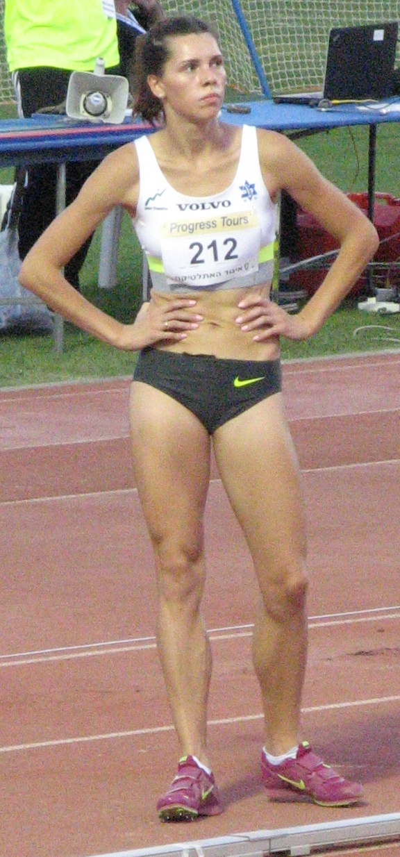 קופצת המשולשת האוקראינית הישראלית חנה קנייזבה-מיננקו במהלך היום הראשון של אליפות ישראל באתלטיקה קלה לשנת 2015.